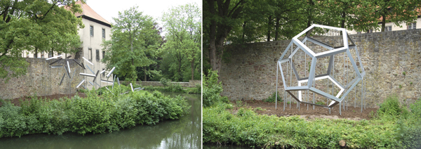 Le temps déployé - Die räumlich entwickelte Anamorphose von Schloß Brake - Yves Charnay mit Claude Prévost - Schloß Brake, Lemgo, 2006